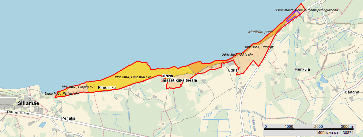 Udria MKA paiknemine kaardil. Põhineb Maa-ameti kaardil.